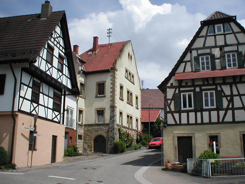 Verschiedene historische Anwesen in der Wainstädter Straße in Sinsheim-Hoffenheim